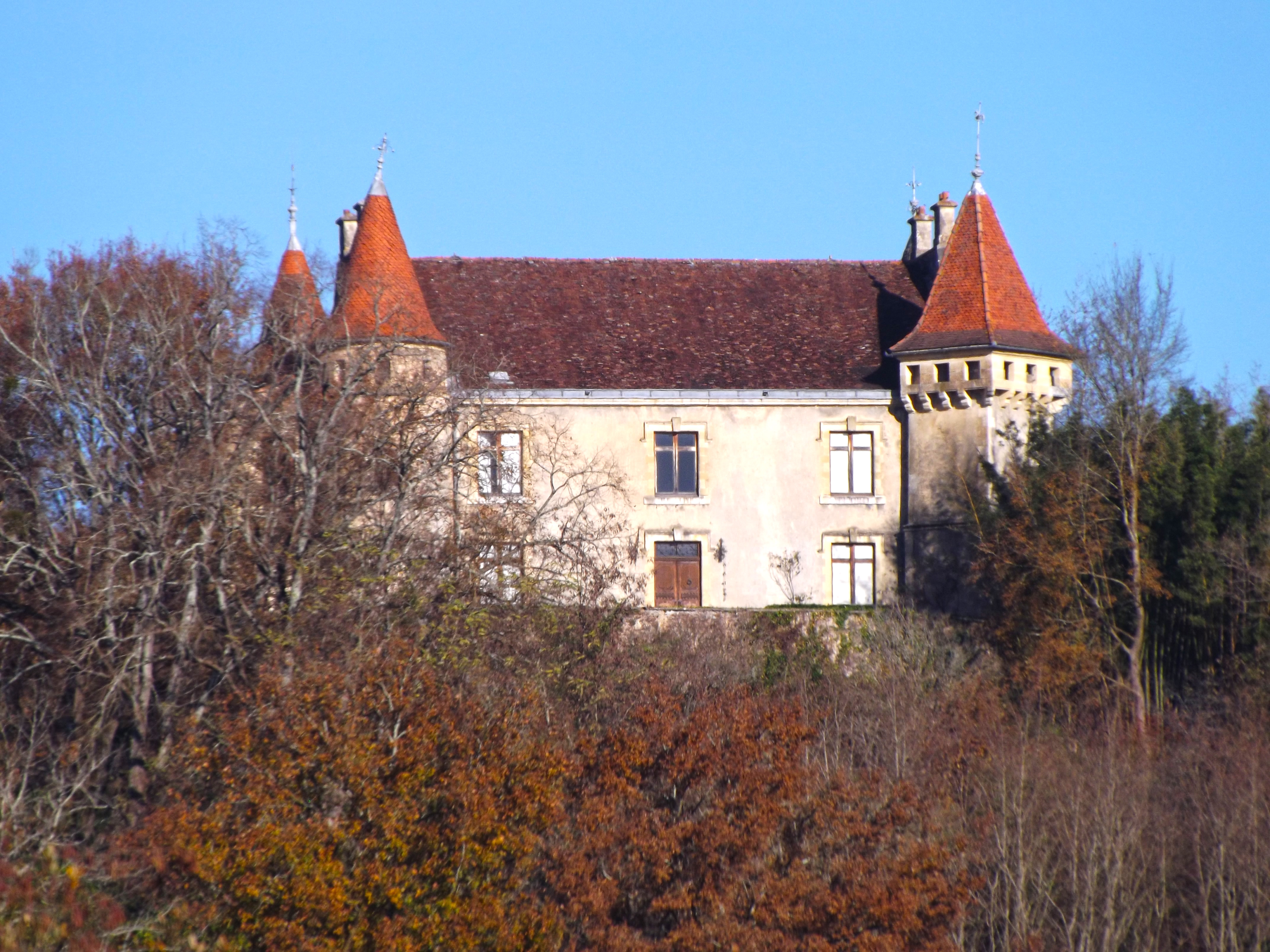 Château de Momuy, Landes, France